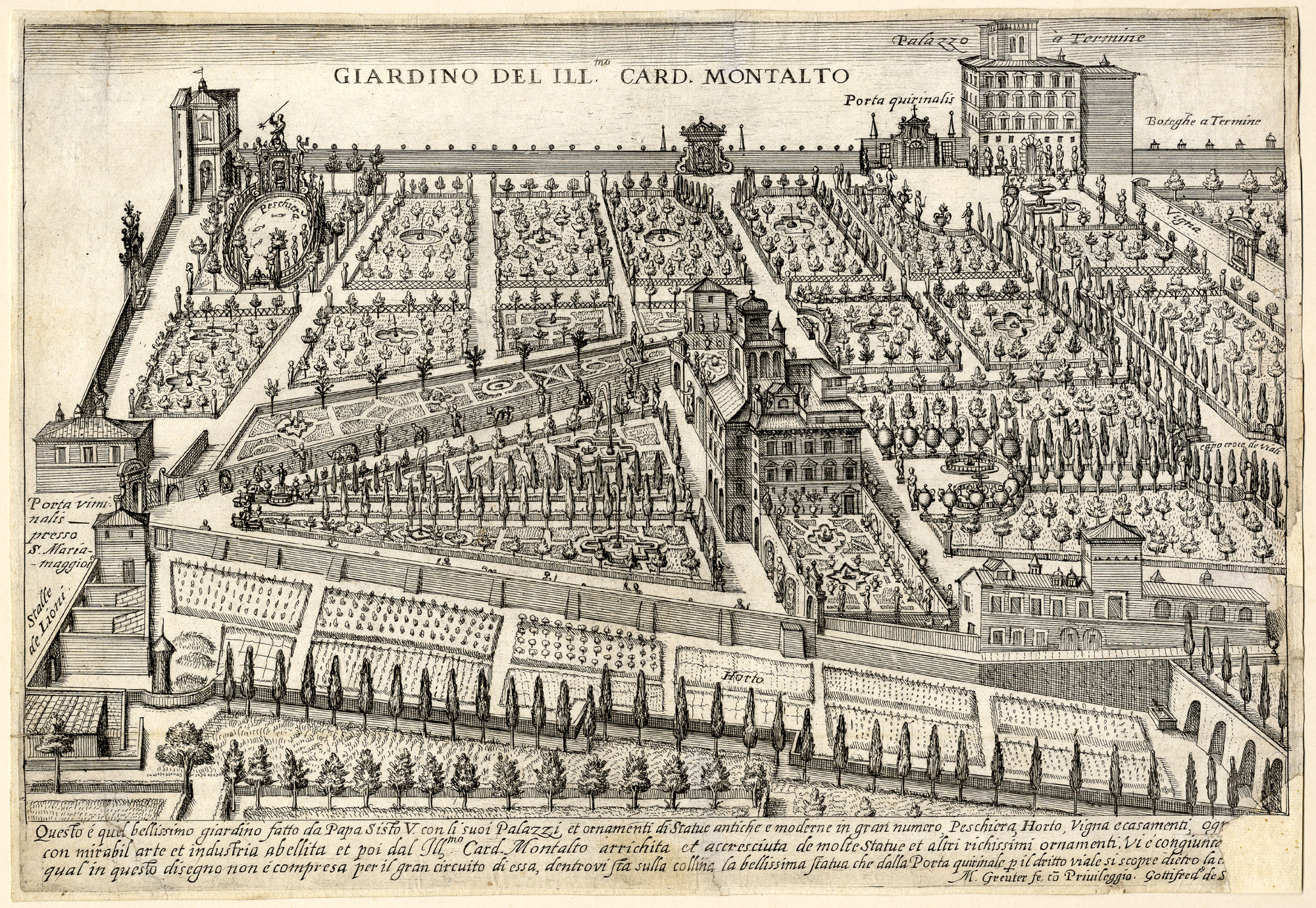 Rom, Giardino del cardinale Montalto (Rom), Kupferstich, nach 1600